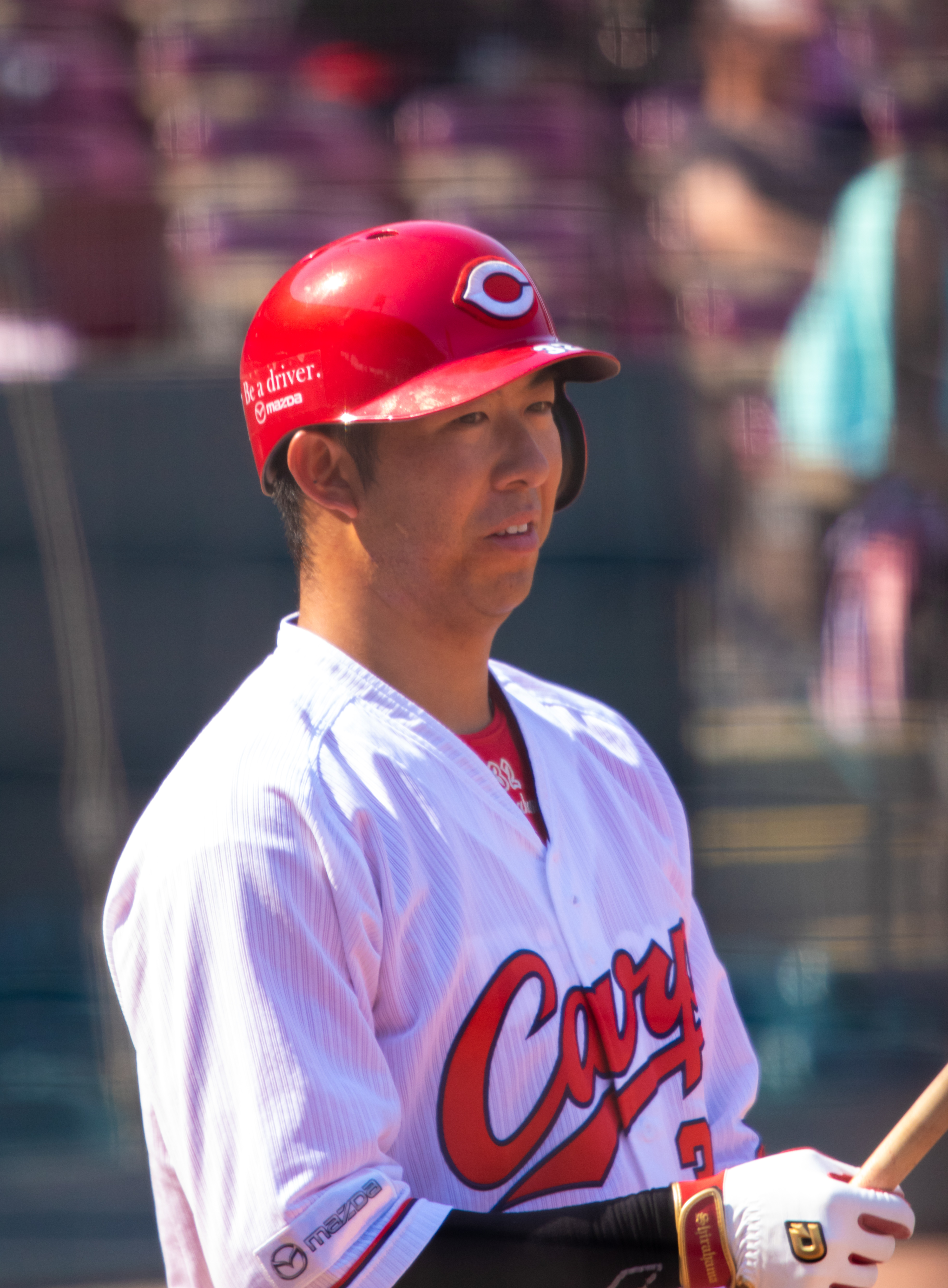 2019/5/24 マツダスタジアム